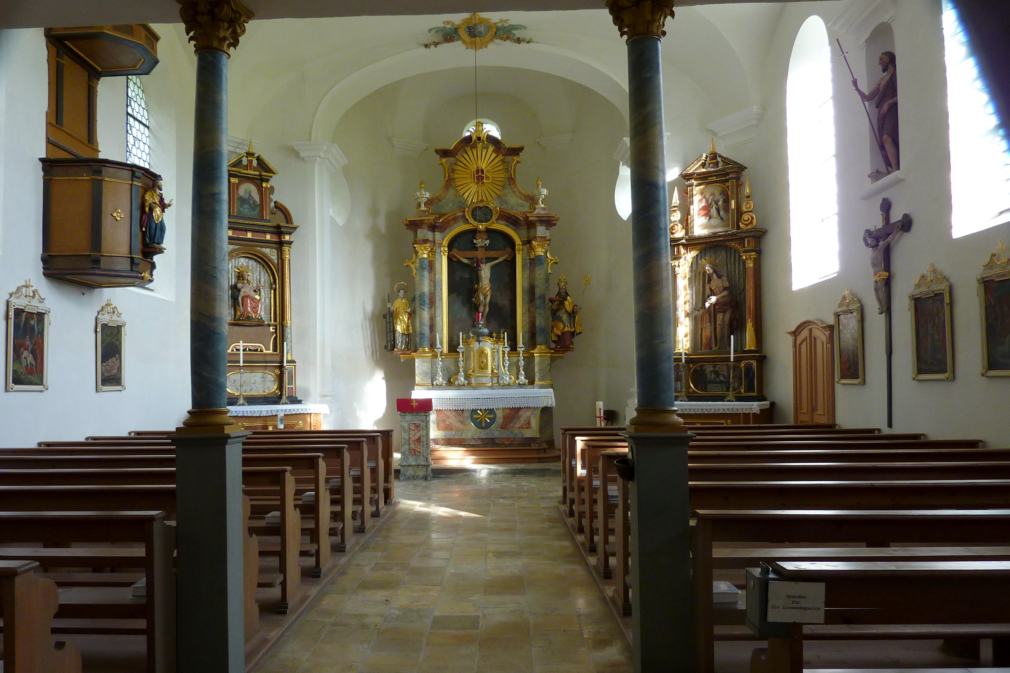 Katholische Kapelle St. Lorenz in Epfach (Denklingen) im Landkreis Landsberg am Lech (Bayern/Deutschland), Innenraum